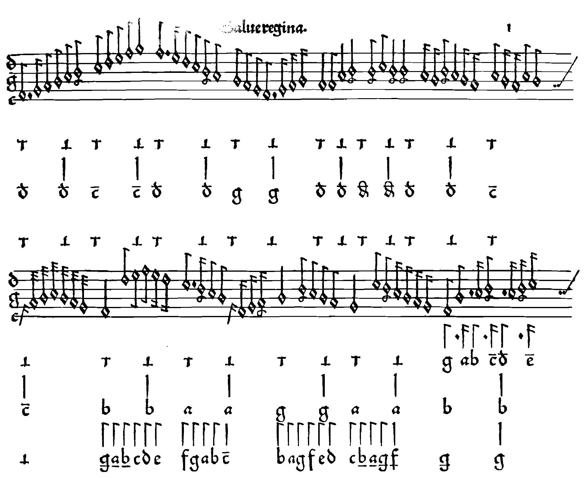 First bars of Arnolt Schlick's Salve Regina, facsimile. From Tabulaturen etlicher lobgesang und lidlein uff die orgeln un lauten (Mainz, 1512)